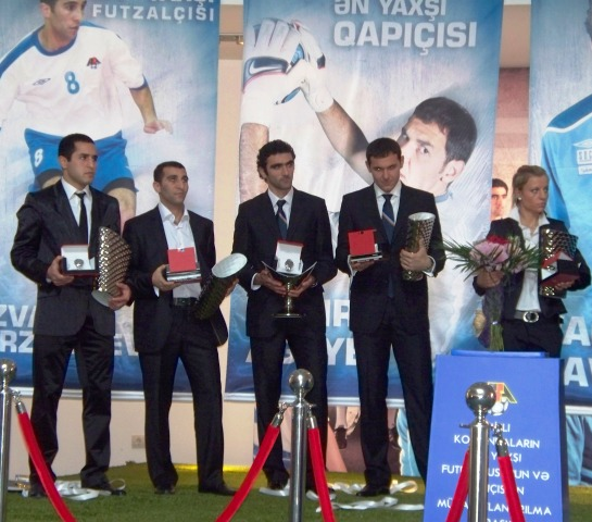 церемония награждения Лучших Футболистов Азербайджана 2009